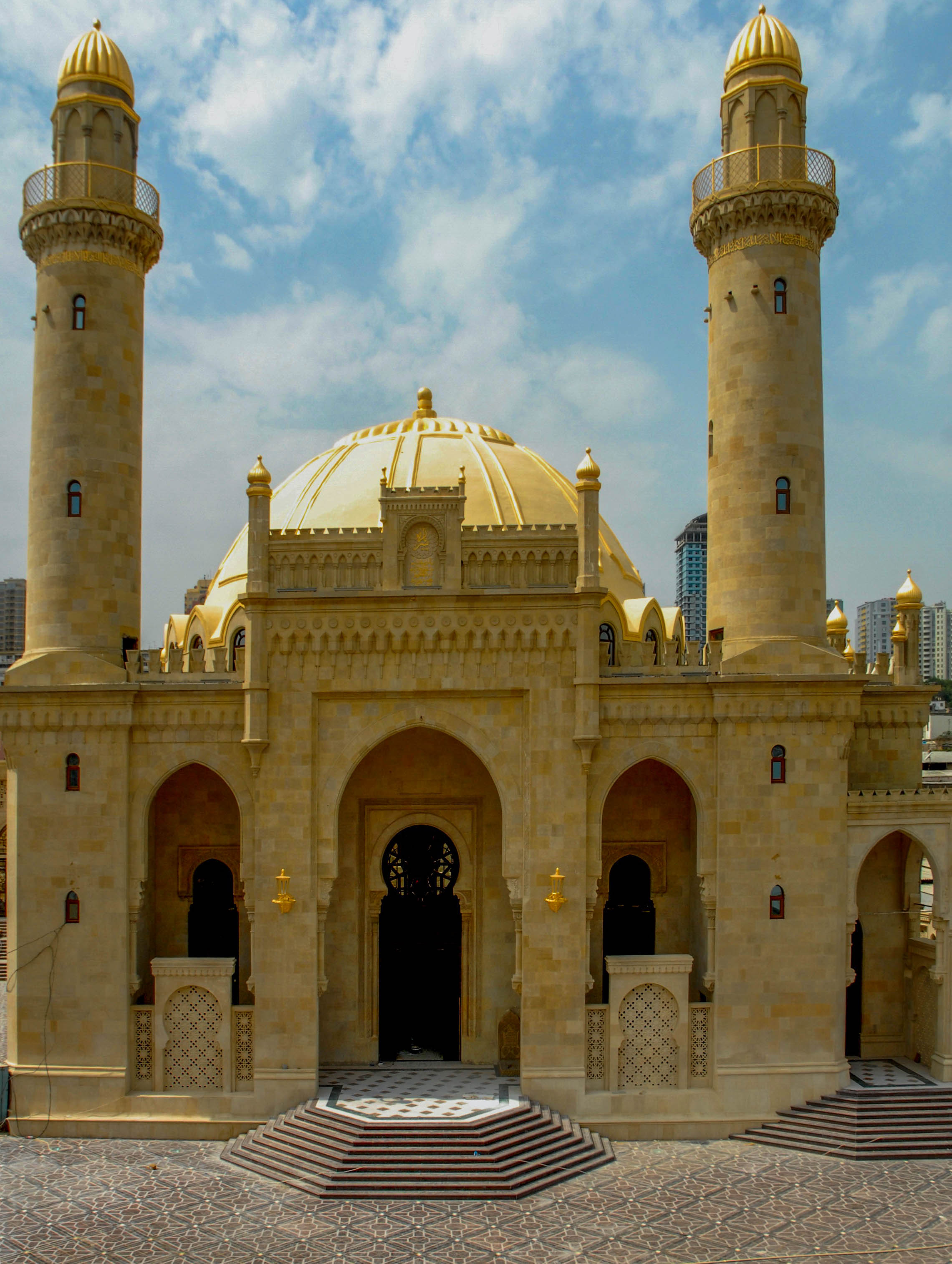 Təzəpir məscidi